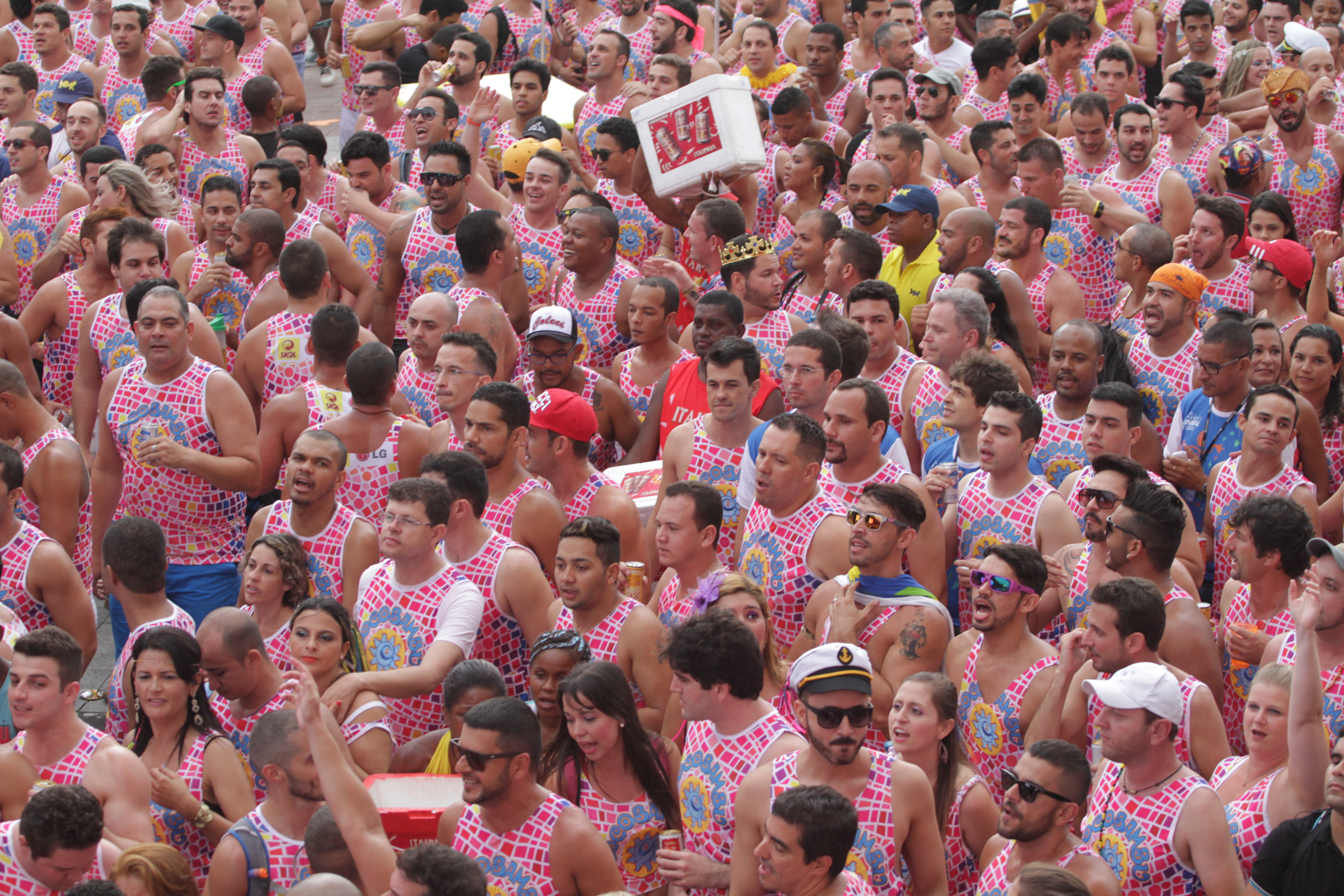 Carnaval Barra-Ondina 2014